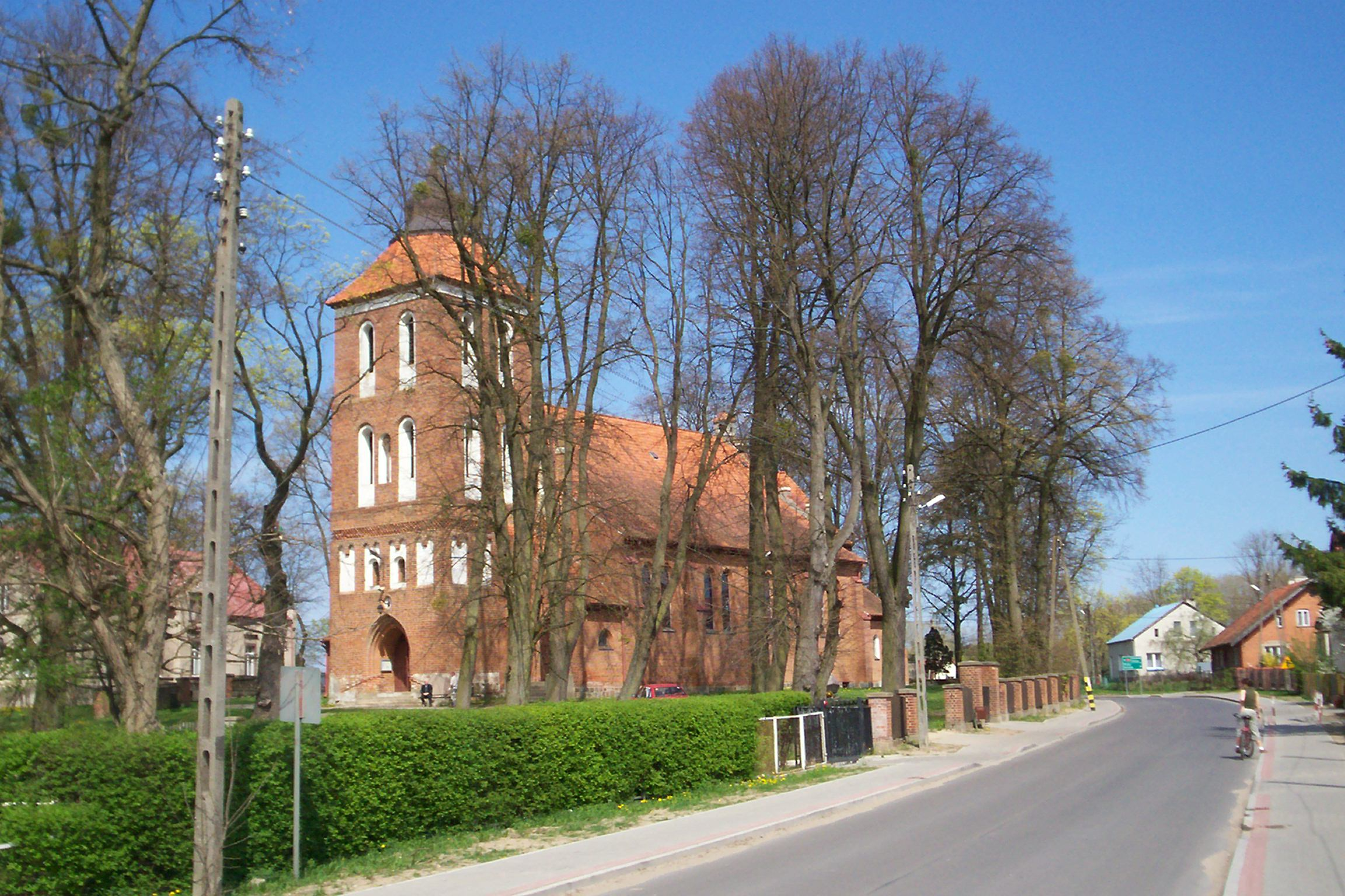 Koścół we wsi Bartąg